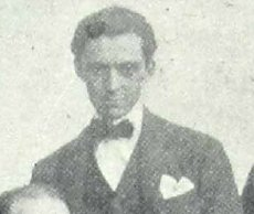 Pablo Vrillaud, presidente de la Federación de Estudiantes de Santa Fe, junto a la delegación santafesina en el Primer Congreso Nacional de Estudiantes de la FUA, en Córdoba, julio de 1918.